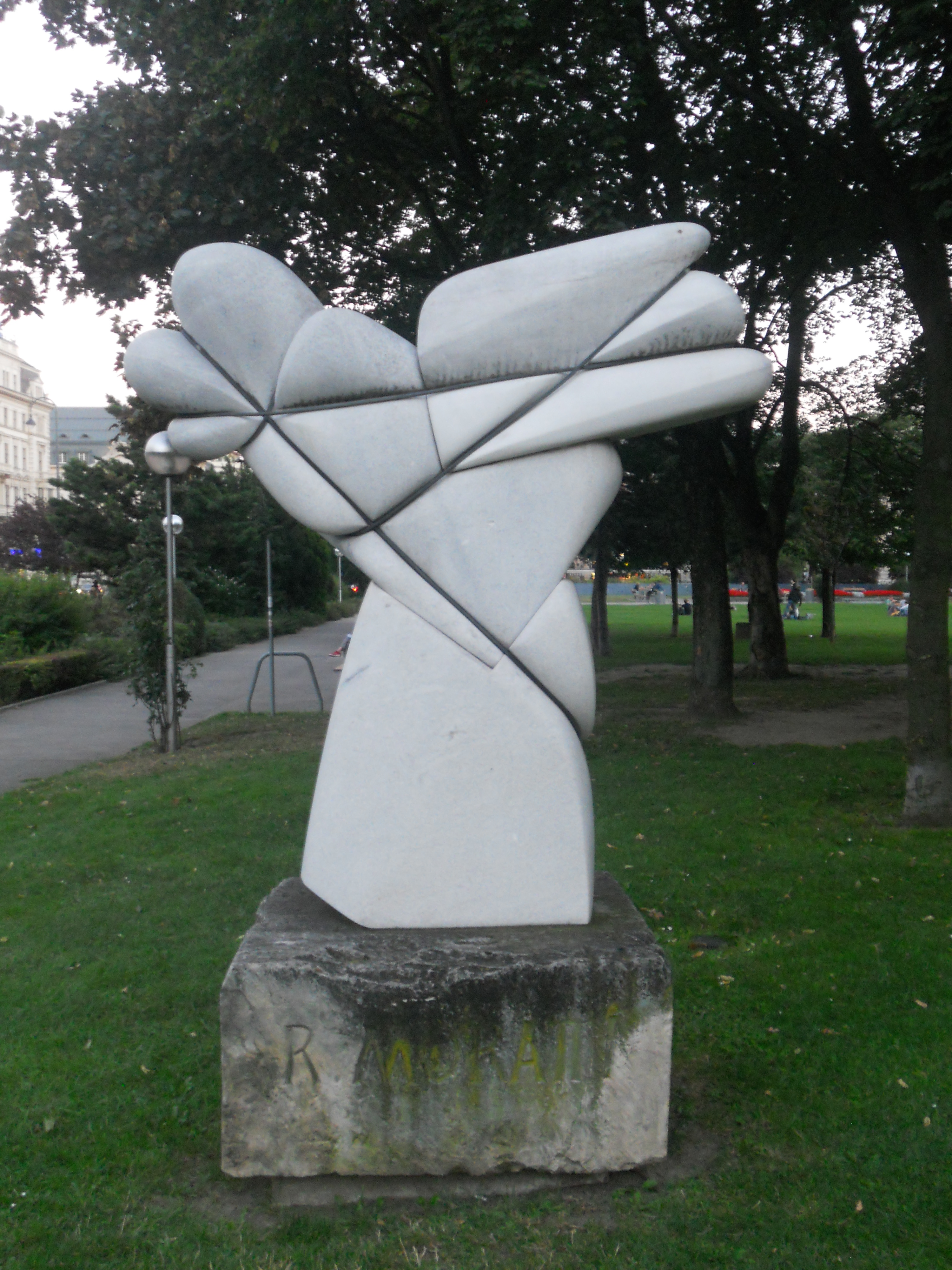 "Sterzinger, Carrara, Schlesischer", Skulptur von Rudolf Moratti im Sigmund-Freud-Park in Wien